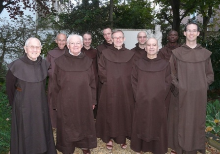 Communauté des Carmes déchaux de Paris